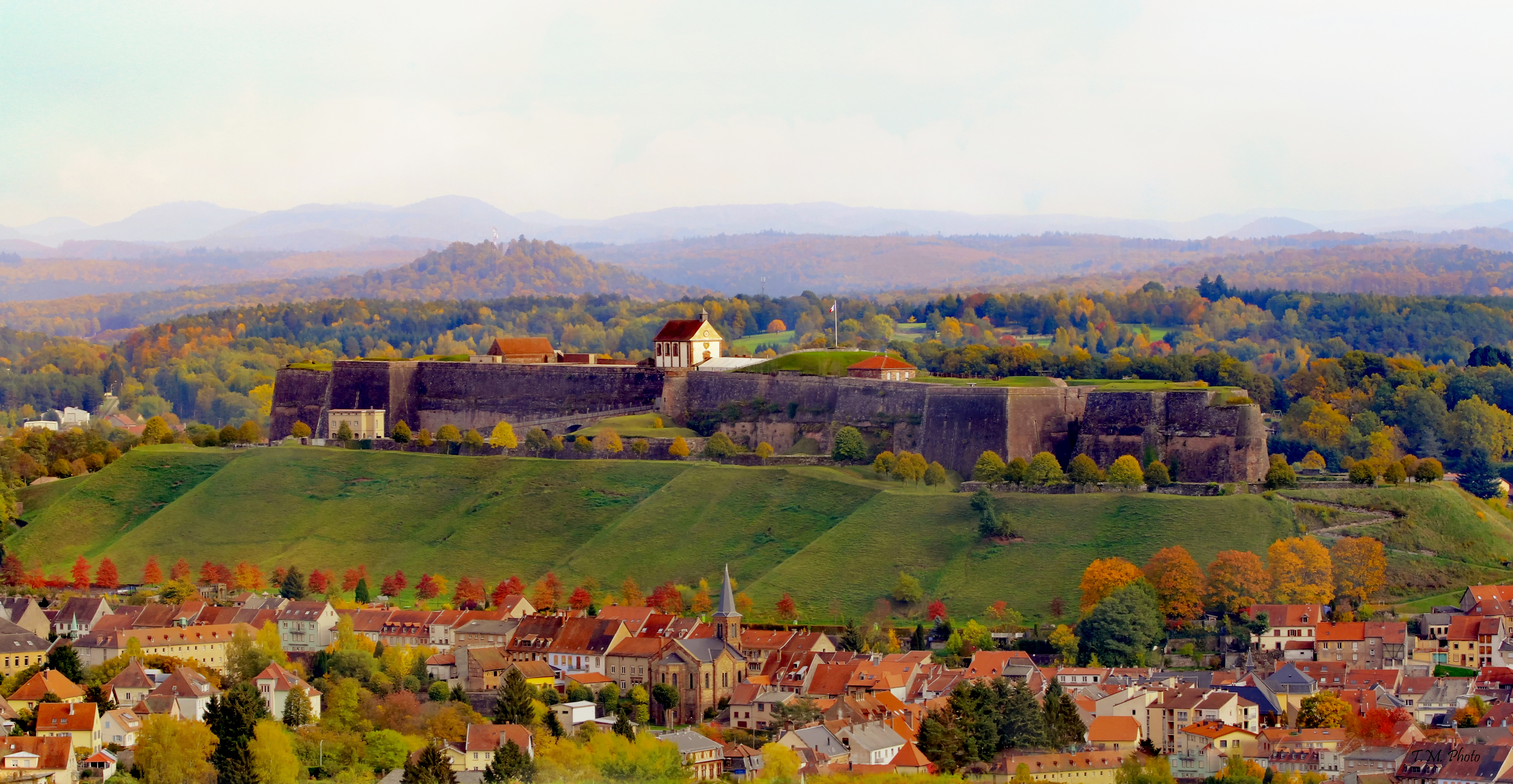 Zitadelle von Bitche